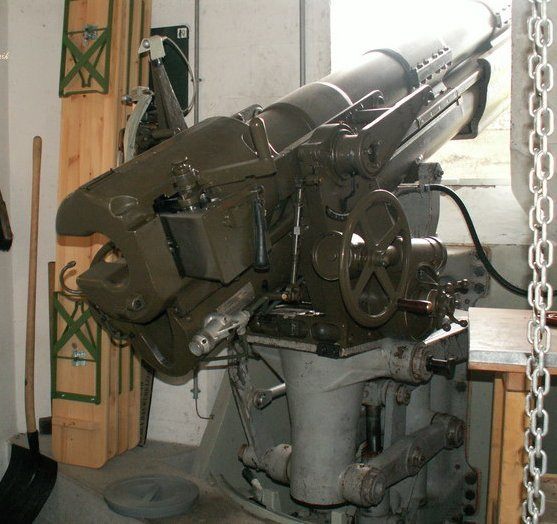 Bunker auf dem Jaunpass Festungskanone 10,5cm